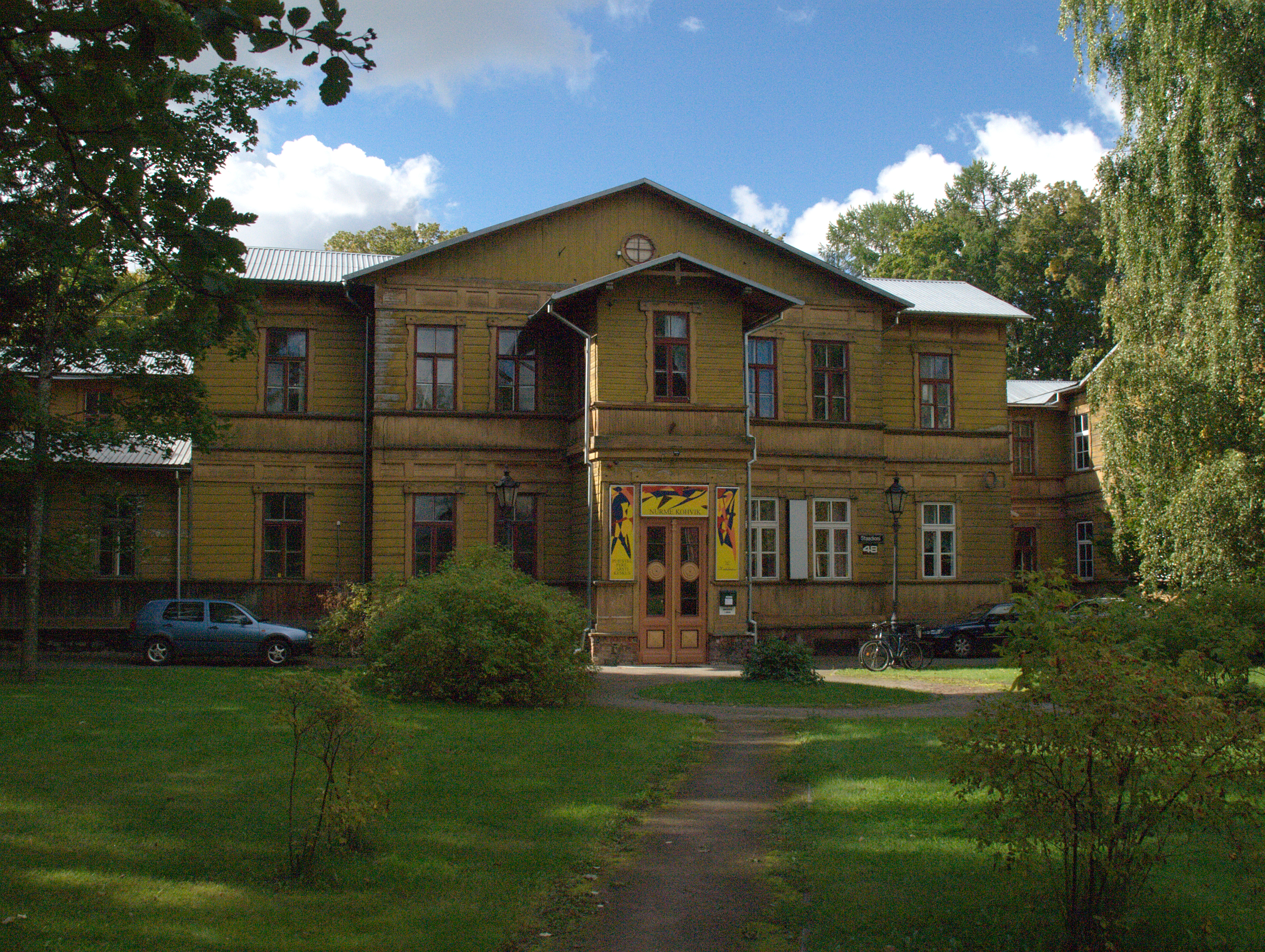 Haiglahoone Tartu, Staadioni 48, 1878.a.